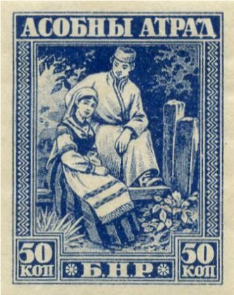 Марка Особого отряда Беларусской Народной Республики (Булак-Балахович)